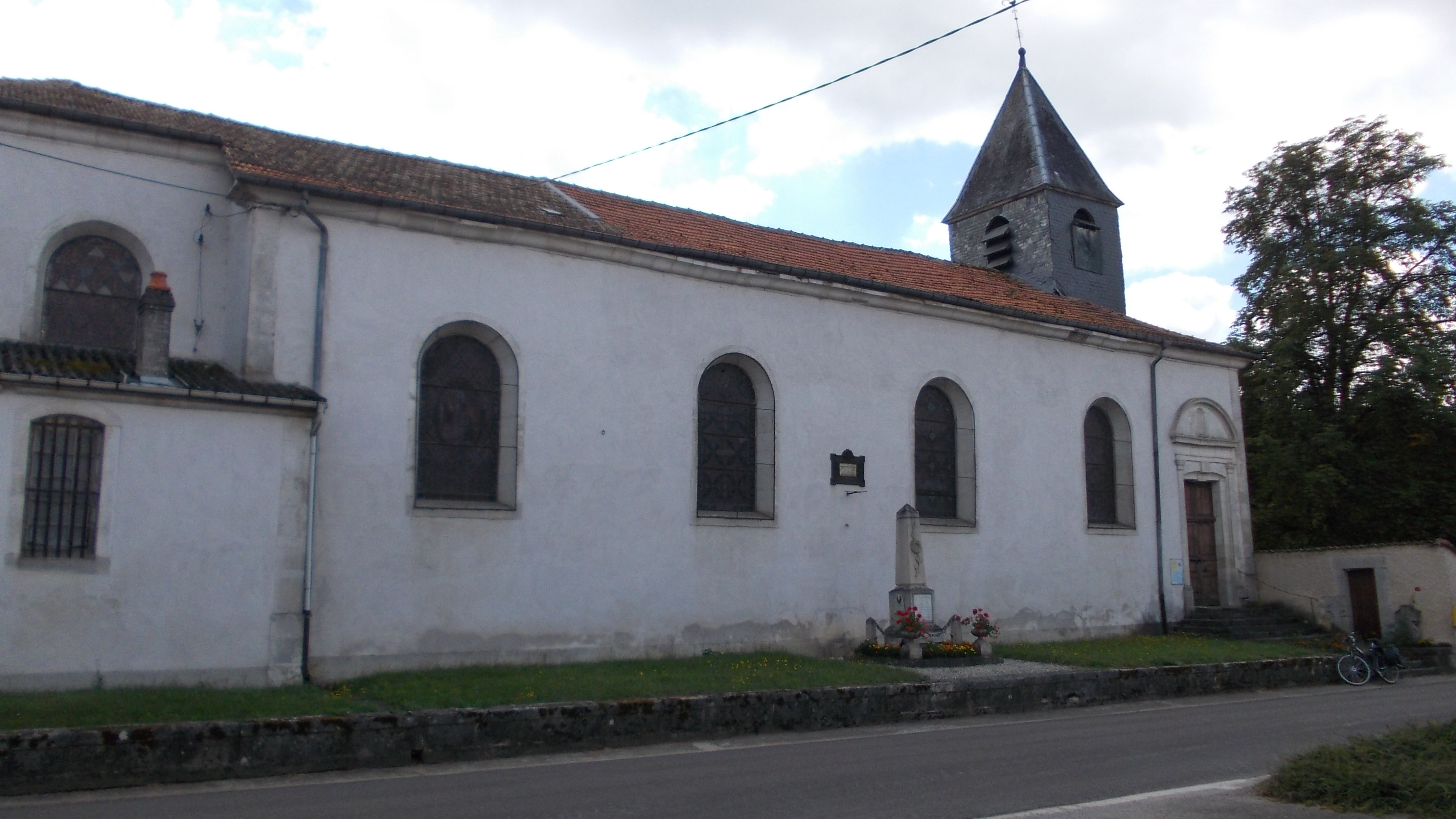 Église de la commune Sauvoy